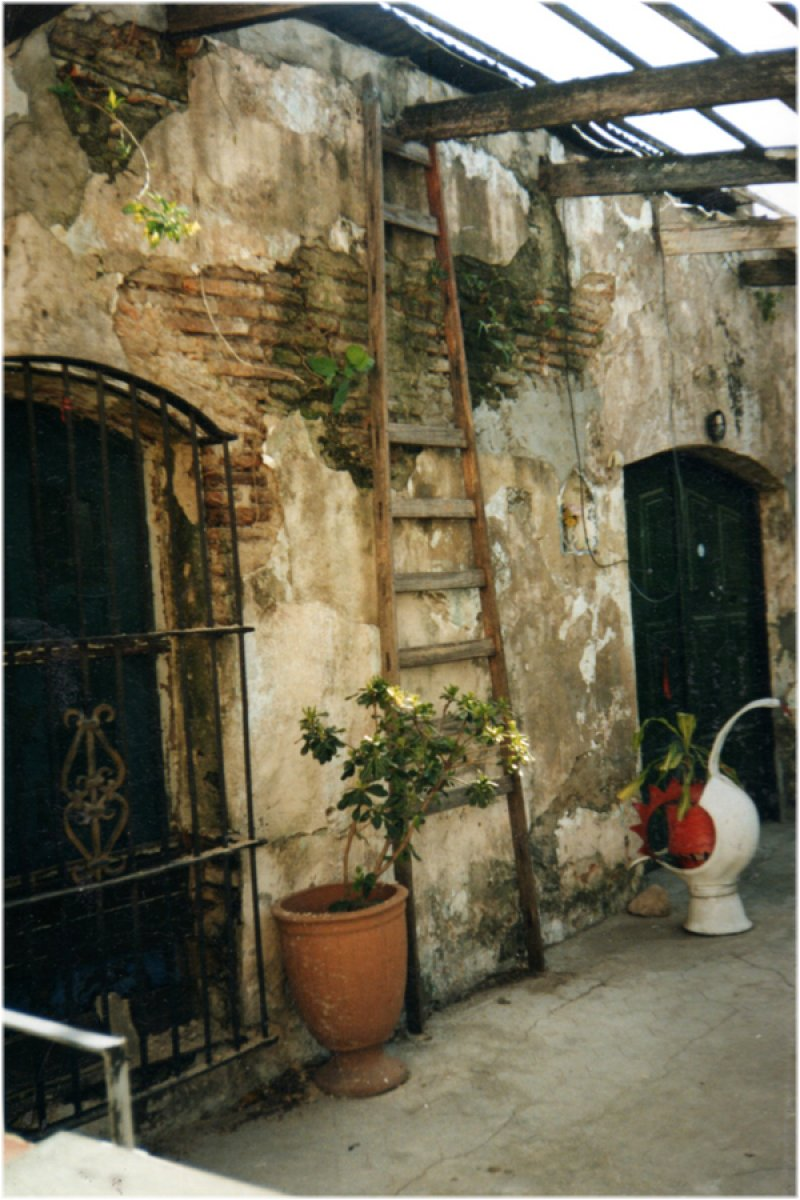 Chacra de los Marquez Marquez, Villa Adelina, noviembre de 1990